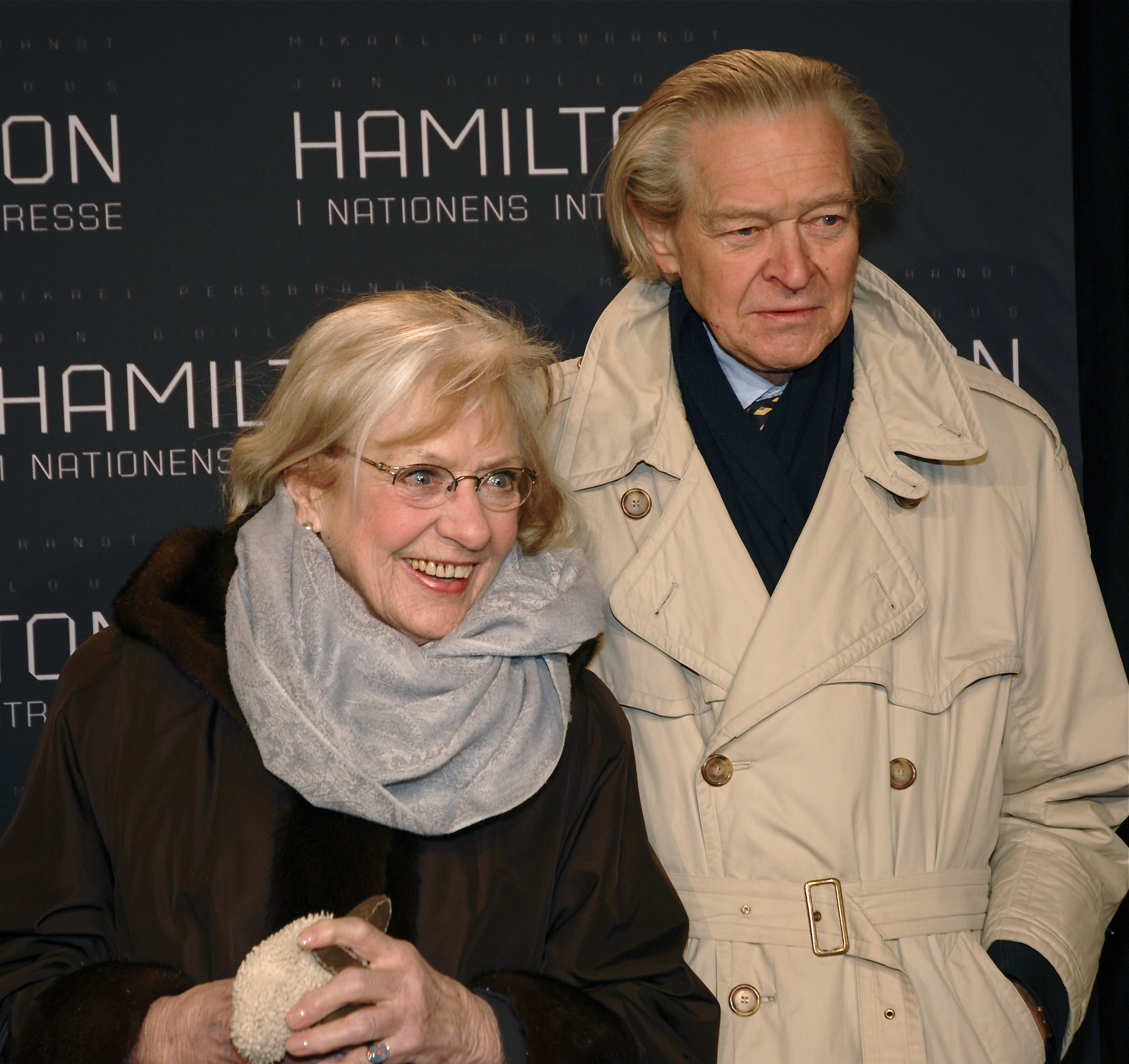 Karin Falck på galapremiären av Hamilton - I nationens intresse, på biograf Sergel i Stockholm den 9 januari 2012.